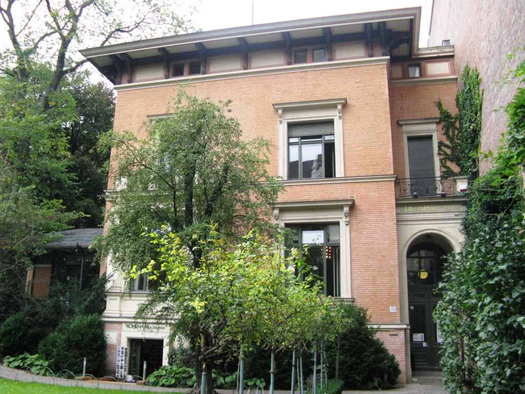 Literaturhaus Berlin mit Park und Kaffeehaus in der Fasanenstraße